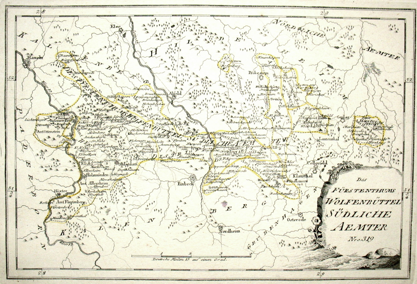 Des Fürstenthums Wolfenbüttel Südliche Aemter. Nro. 319. Kolorierter Kupferstich